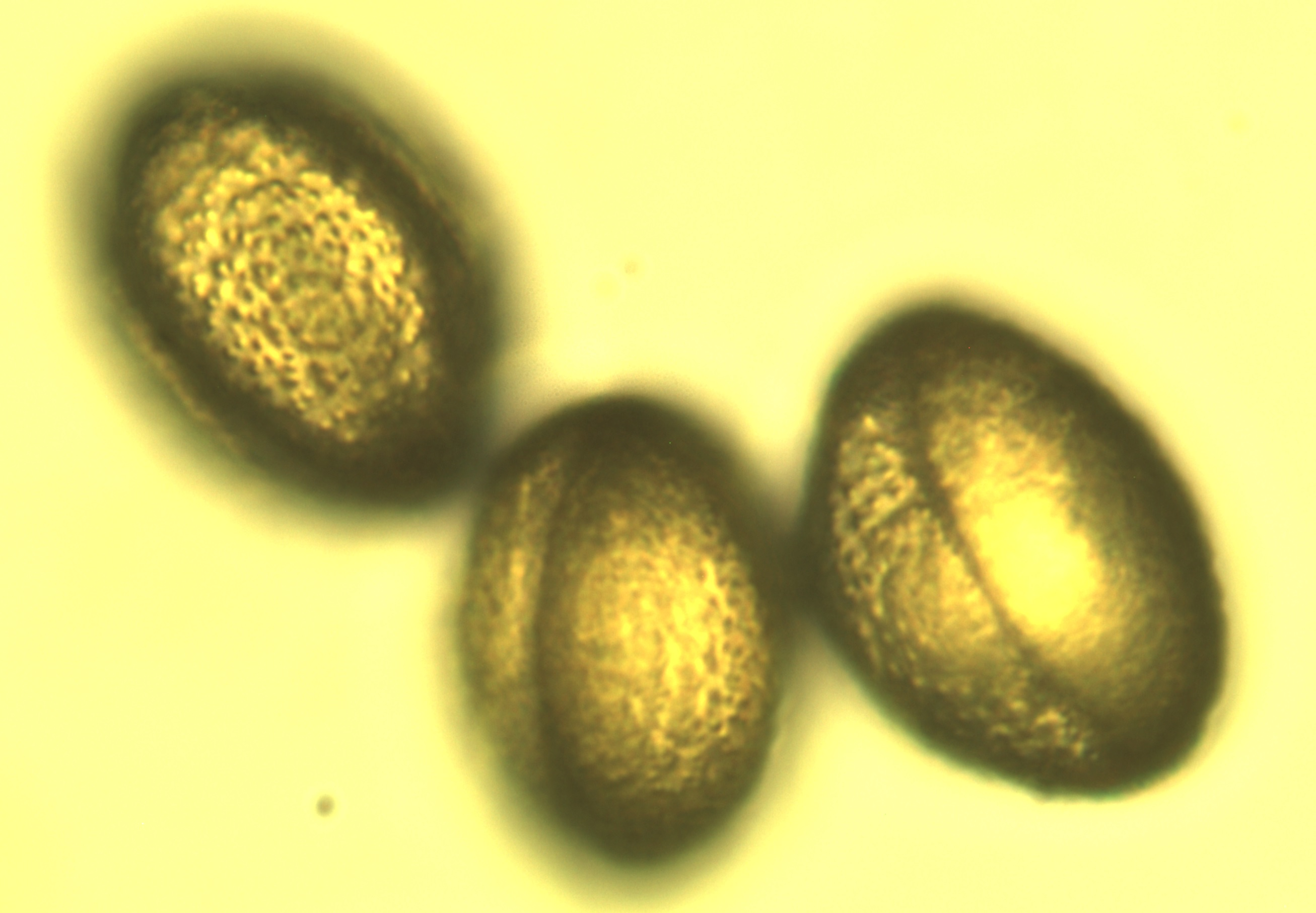 Ficaria verna Pollen 400x